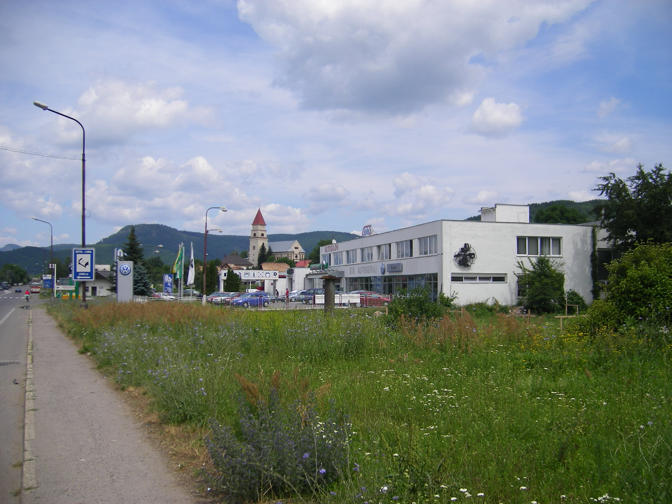 Ladomerská Vieska (okres Žiar nad Hronom)